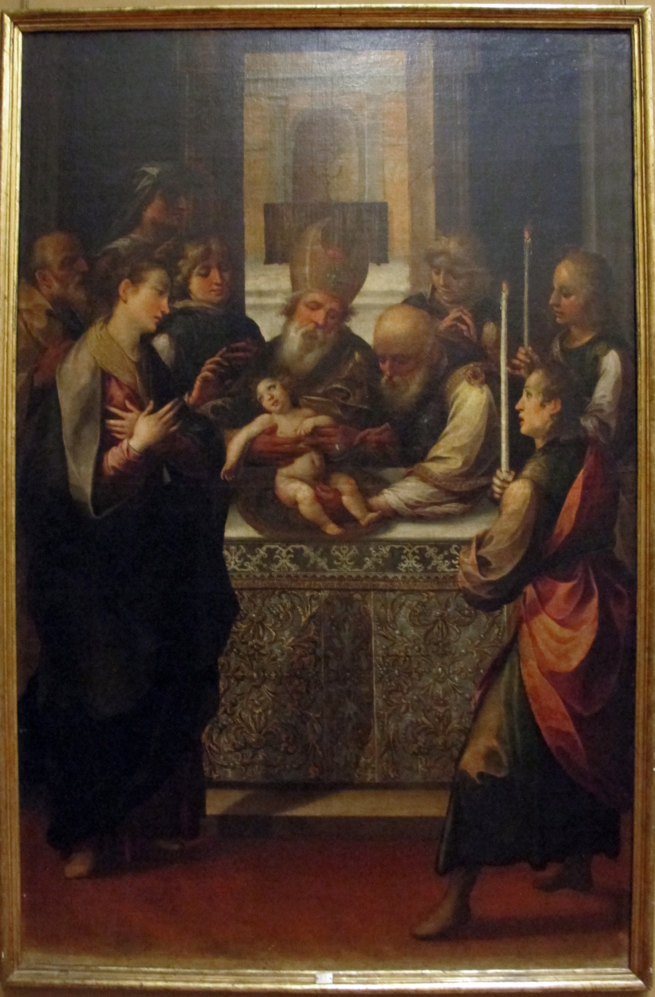 Galleria Napoletana (Museo di Capodimonte)